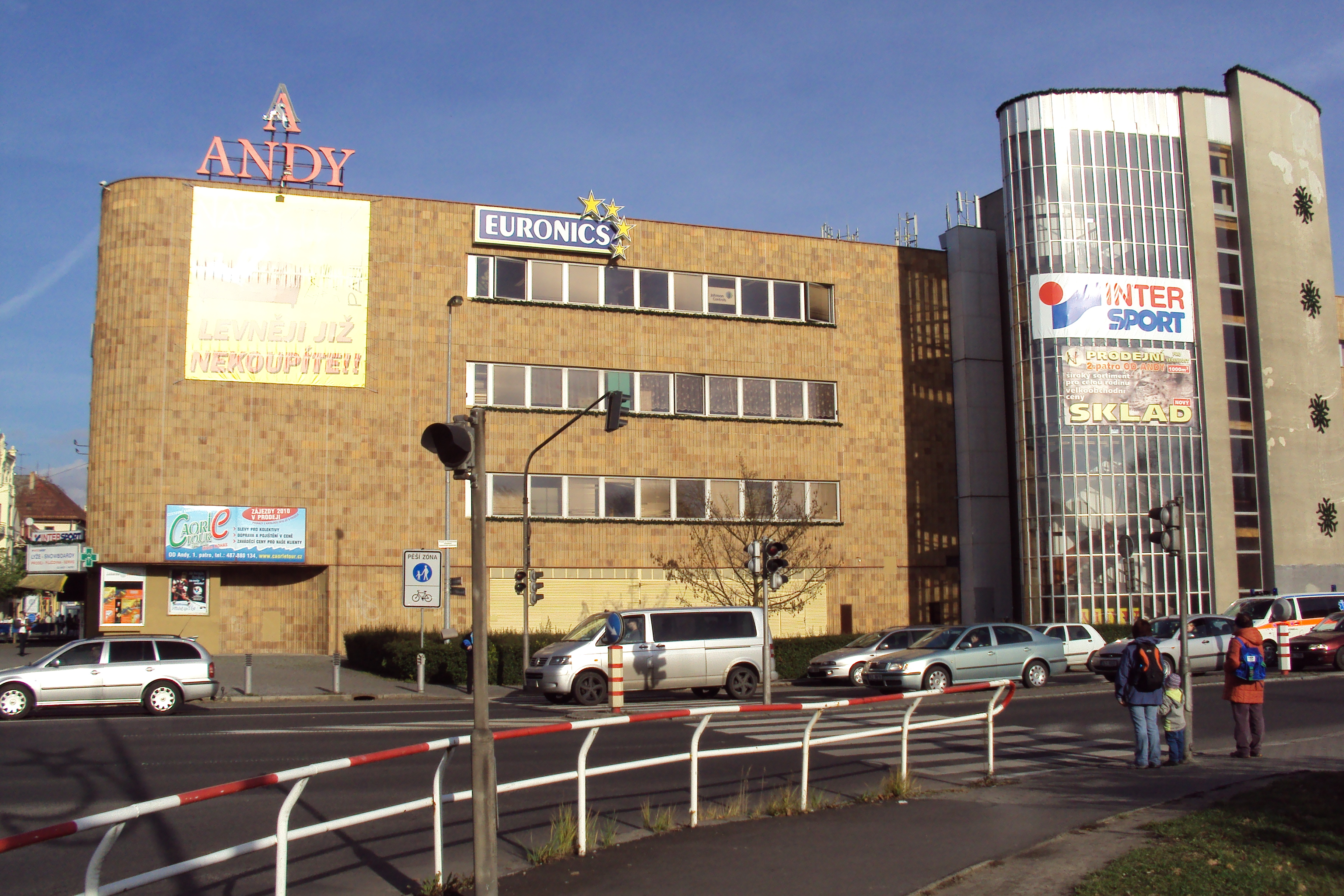 Obchodní dům Andy v centru České Lípy